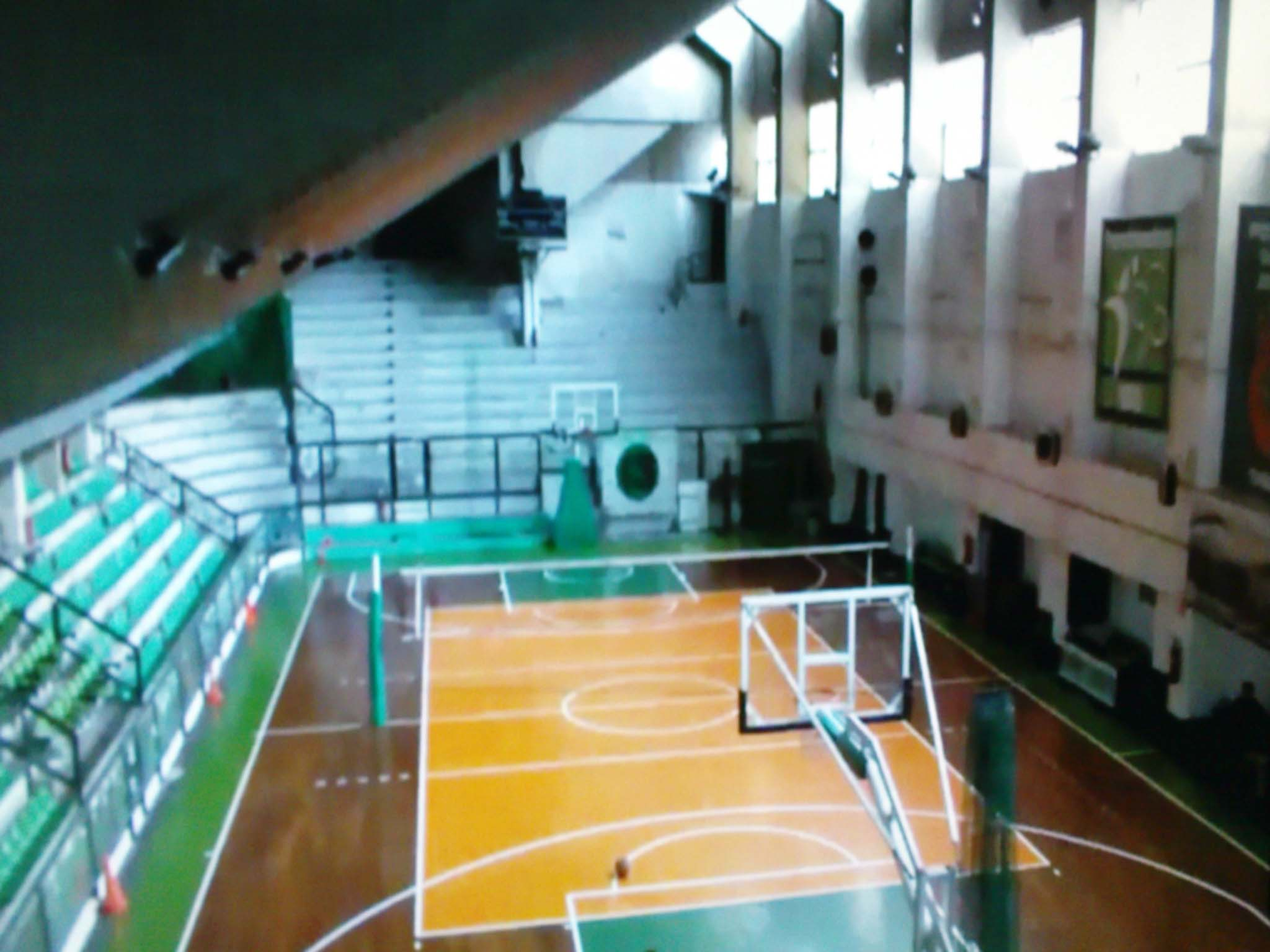 Το γήπεδο μπάσκετ της Λεωφόρου Αλεξάνδρας